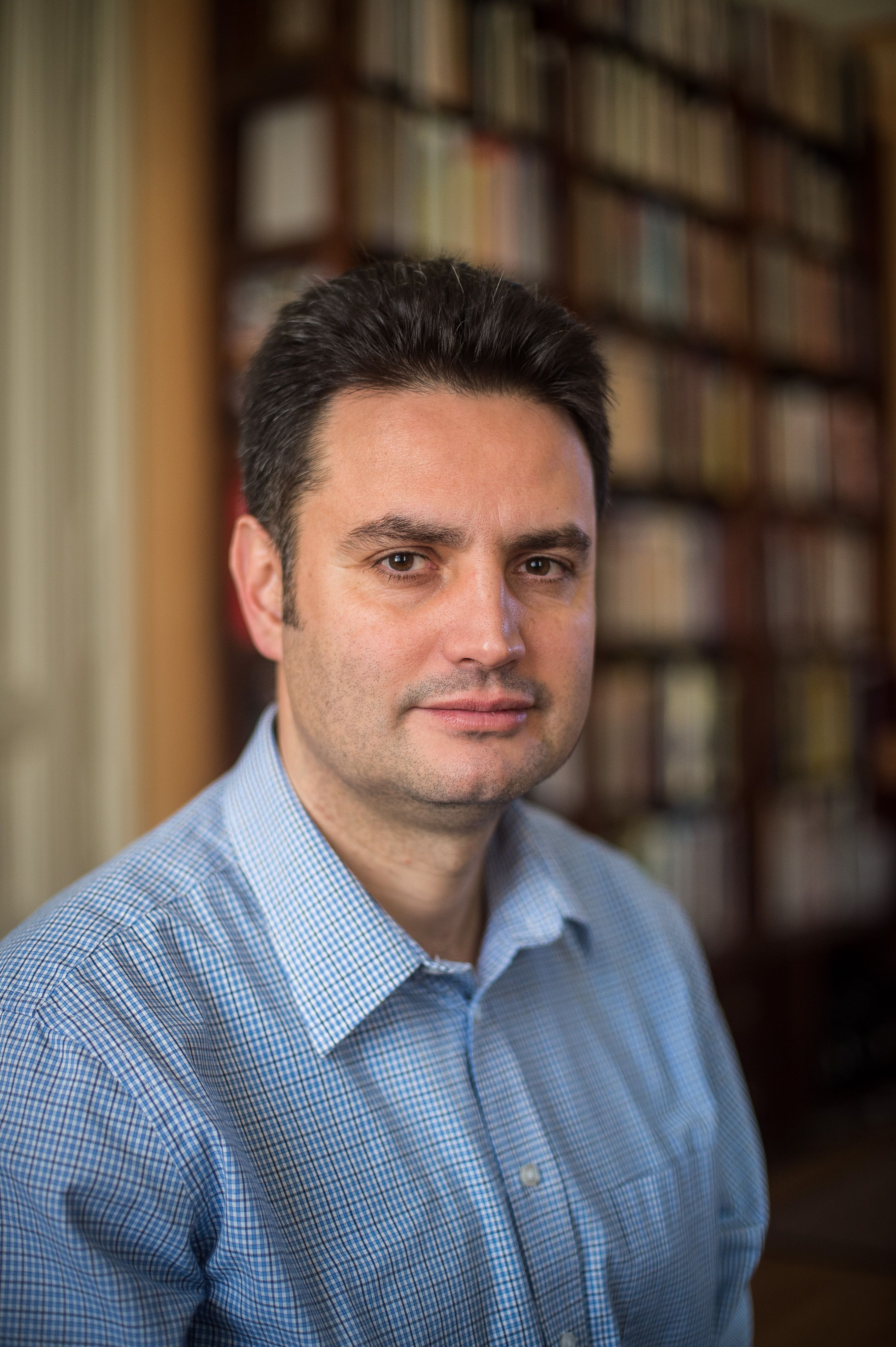 (Sarkadi) Márki-Zay Péter (Hódmezővásárhely, 1972. május 9. –) villamosmérnök, közgazdász, marketingszakember, politikus és történész, 2018 óta Hódmezővásárhely polgármestere.